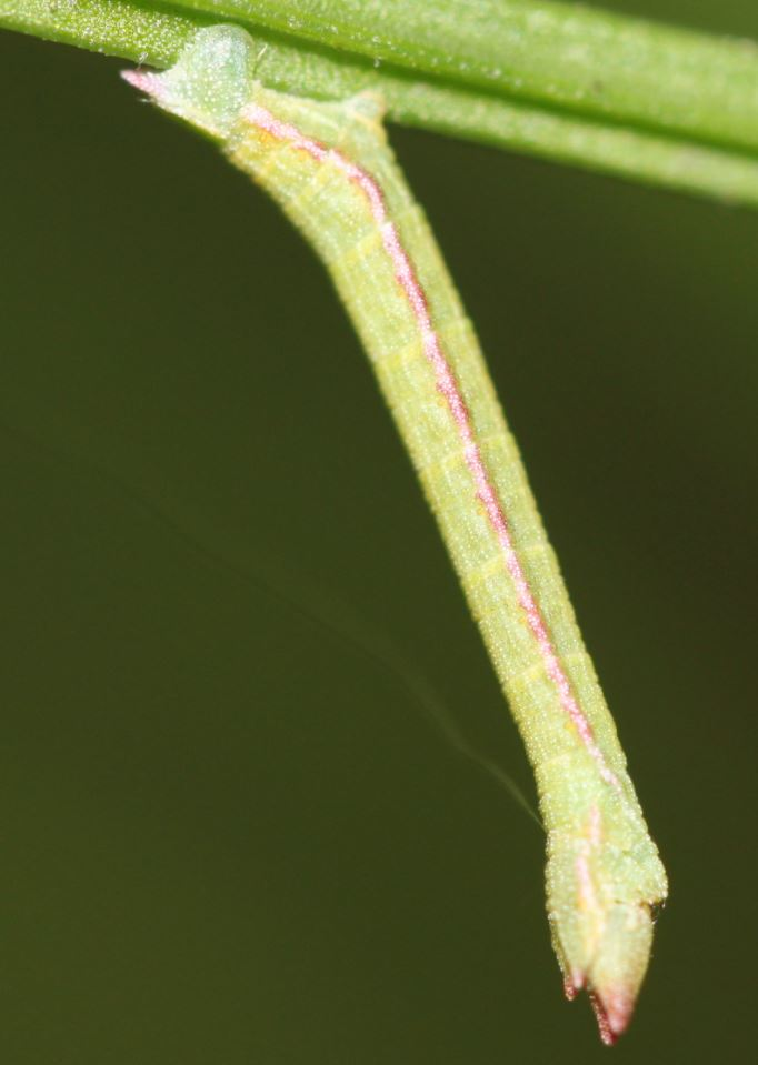 Raupe des Ginster-Grünspanner (Pseudoterpna pruinata) am 4.10.2016 in der Schwetzinger Hardt